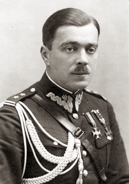 Mieczysław Rawicz-Mysłowski